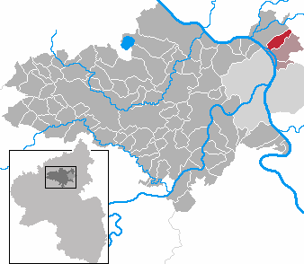 Weitersburg in Rhineland-Palatinate - district Mayen-Koblenz